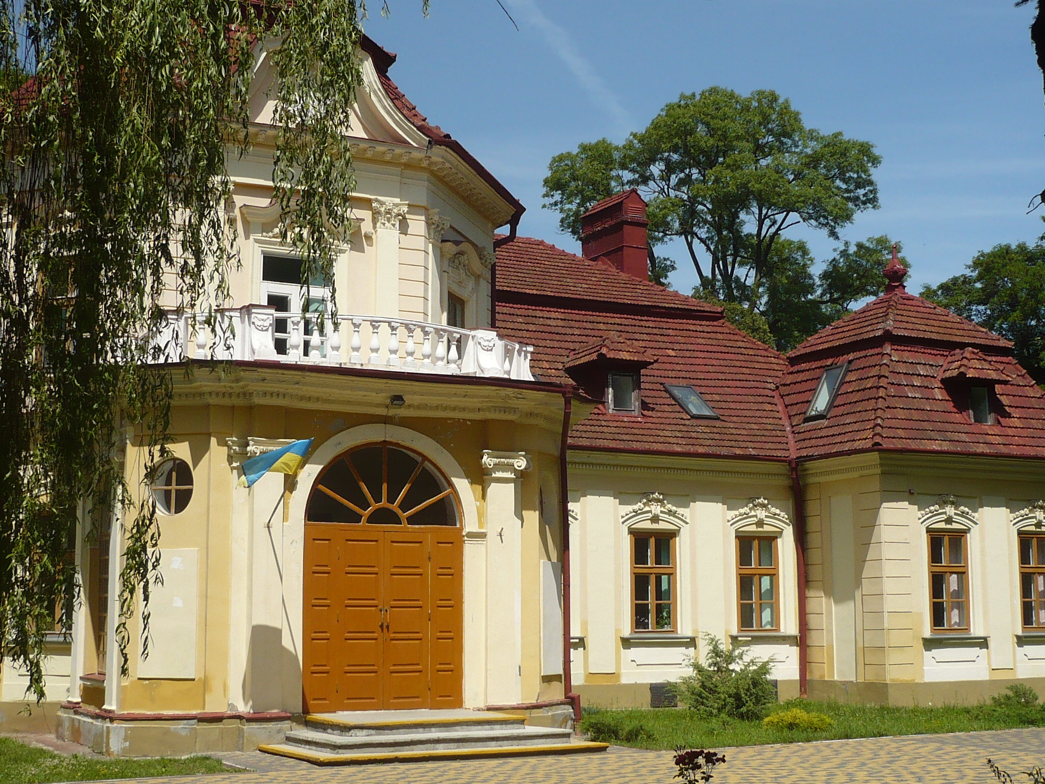 Pałac. Lubień Wielki